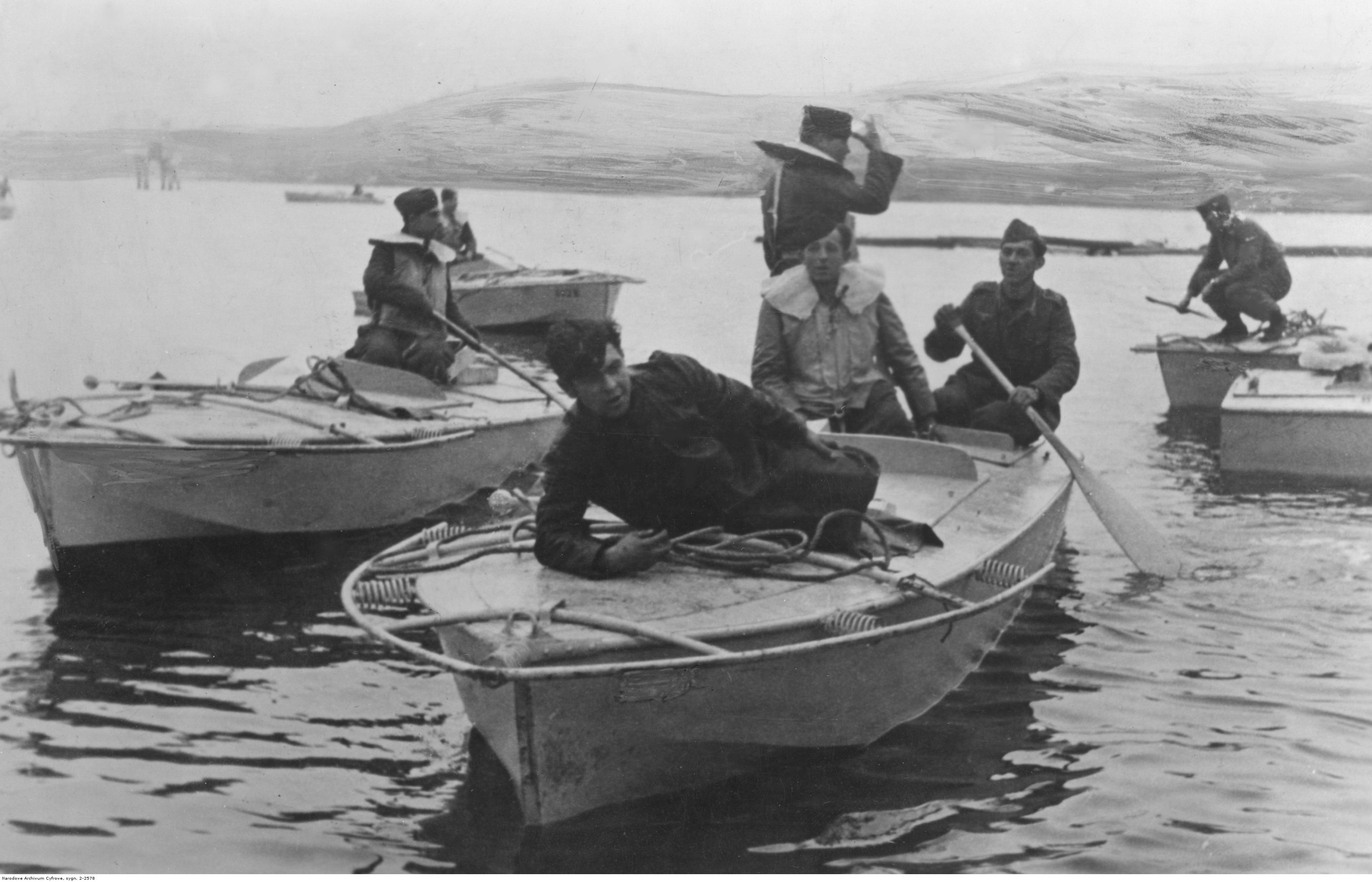 Niemieckie łodzie torpedowe wybuchowe wpływają do bazy po zakończonych ćwiczeniach.